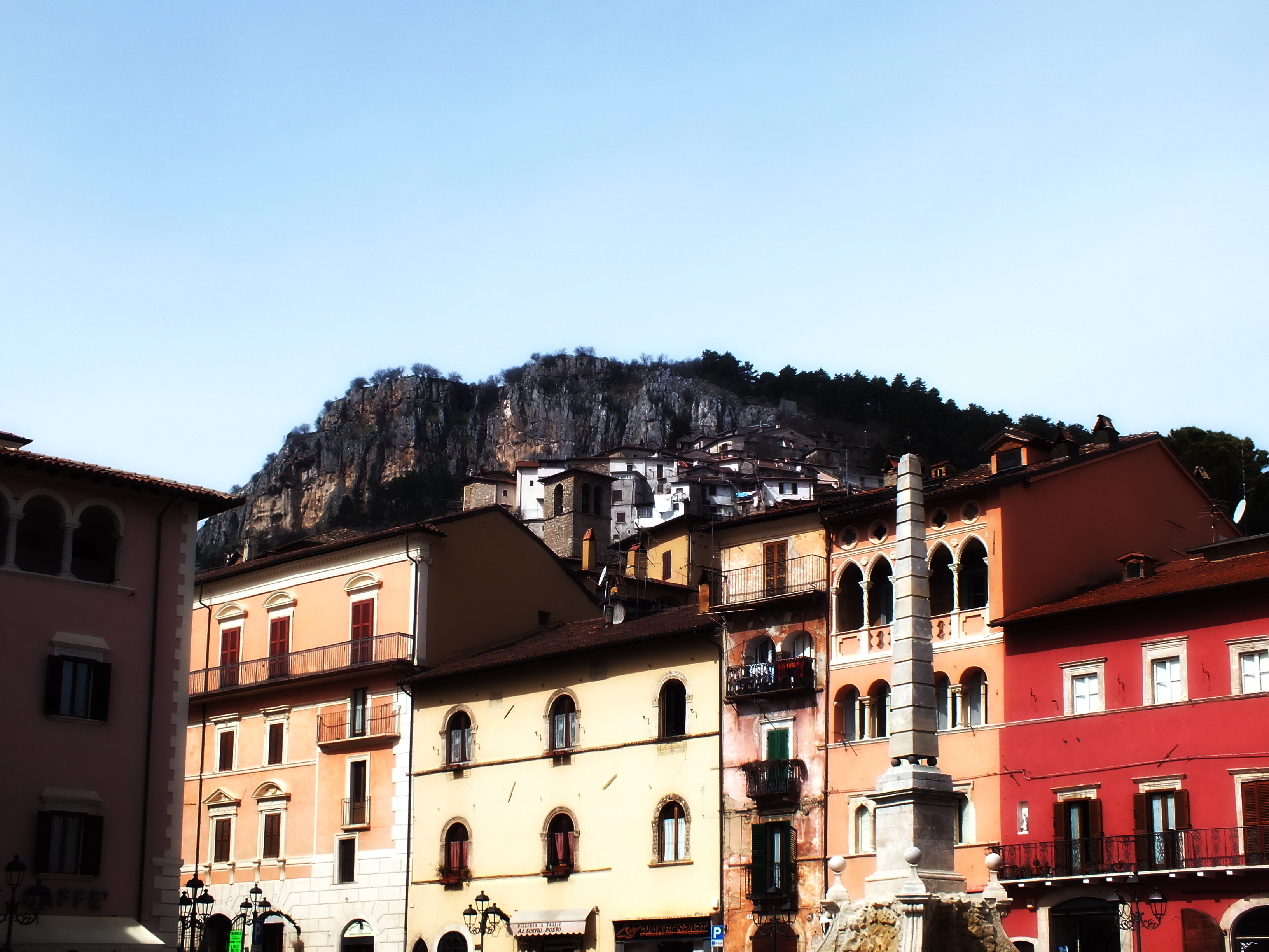 Tagliacozzo dalla piazza principale